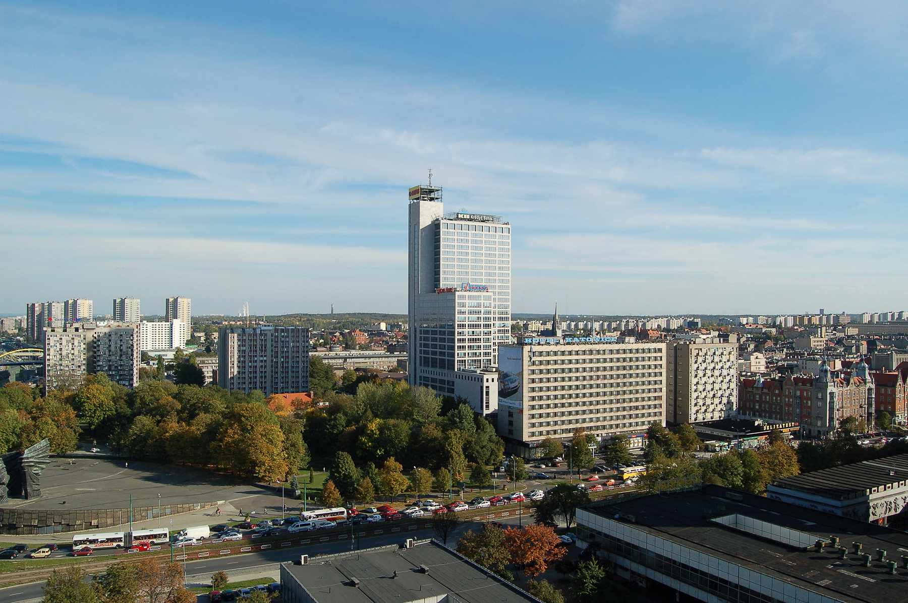 Altus i okolice